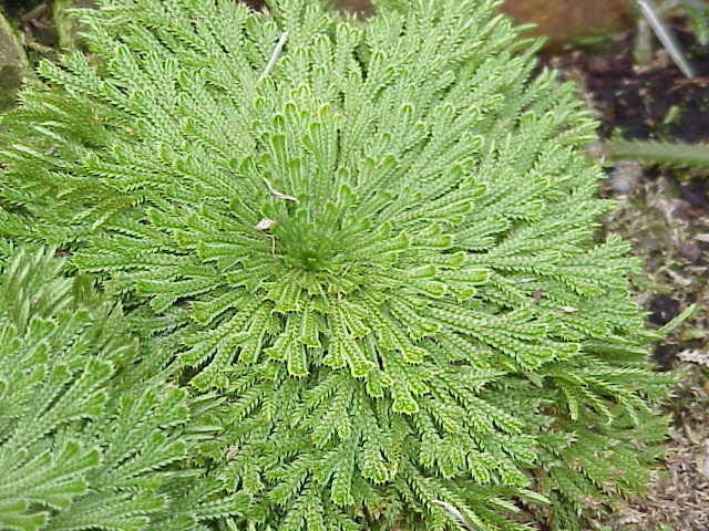 Species: Selaginella pilifera Family: Selaginellaceae Image No. 2